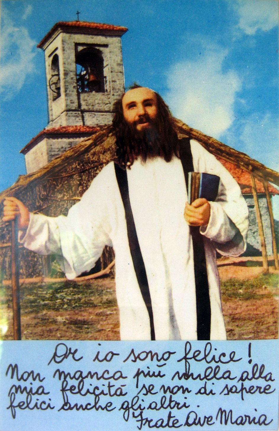 Eremo di Sant'Alberto di Butrio (Pavia), affidato agli Eremiti della Divina Provvidenza fondati da San Luigi Orione. Foto di Frate Ave Maria con una delle sue frasi più celebri.